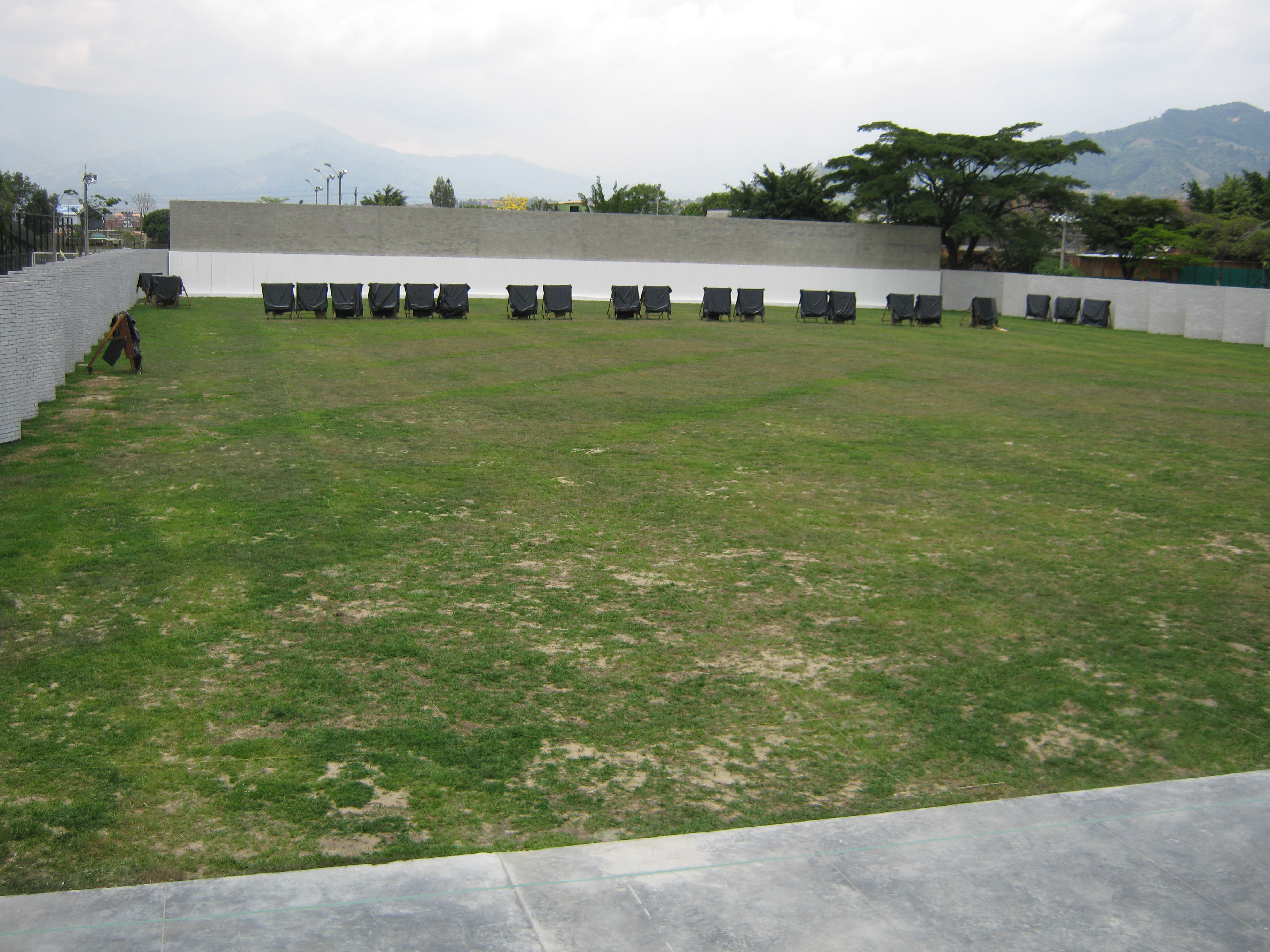 Campo de Tiro con Arco, Unidad deportiva de Belén, Medellín, Colombia.